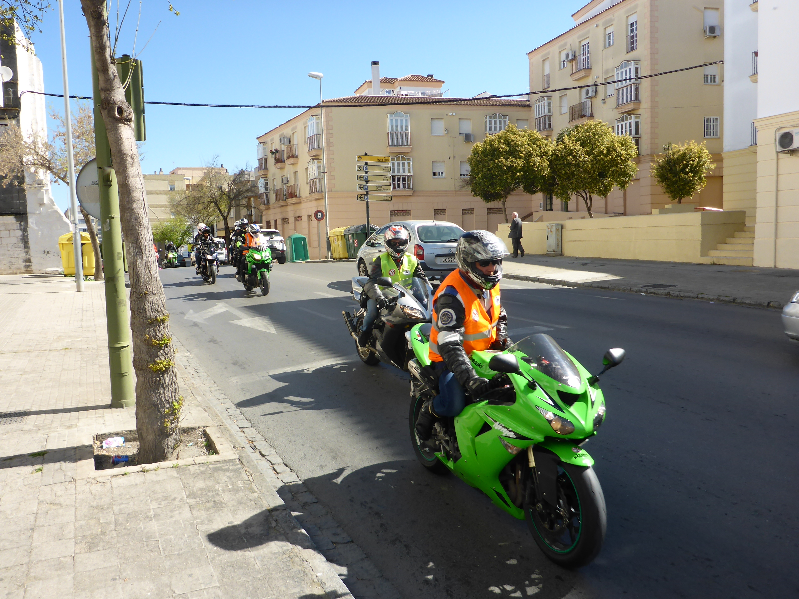 Concentración motera Jerez-Cádiz el 2 de abril de 2017